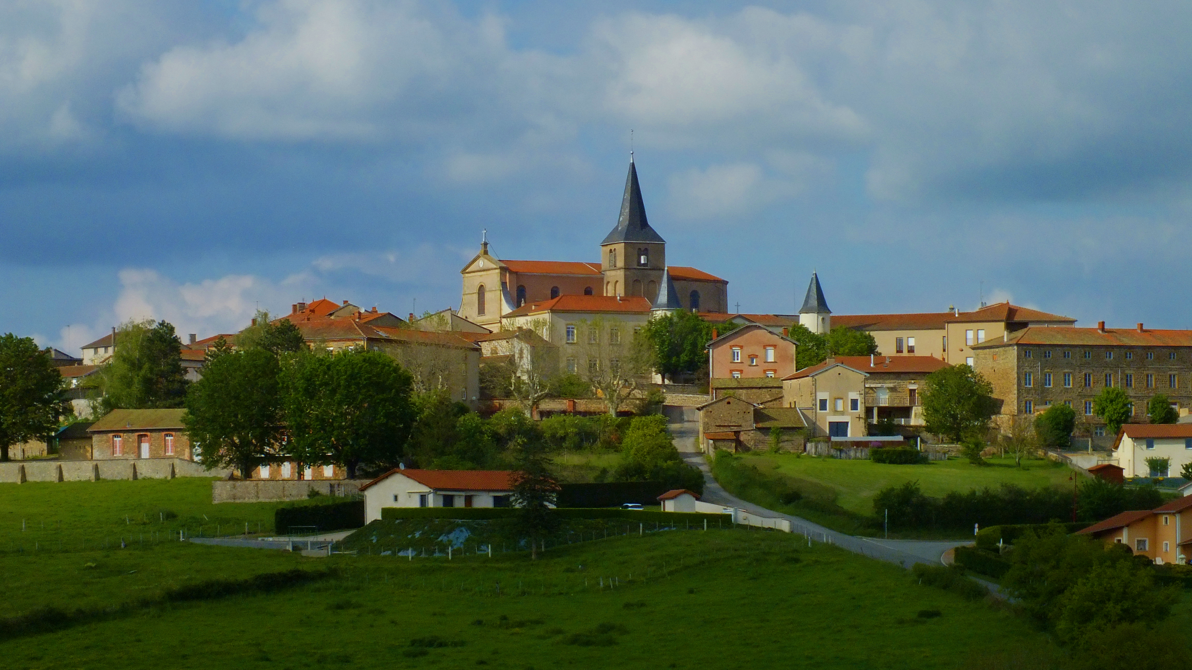 Saint-Symphorien-de-Lay - Eglise Paroissiale